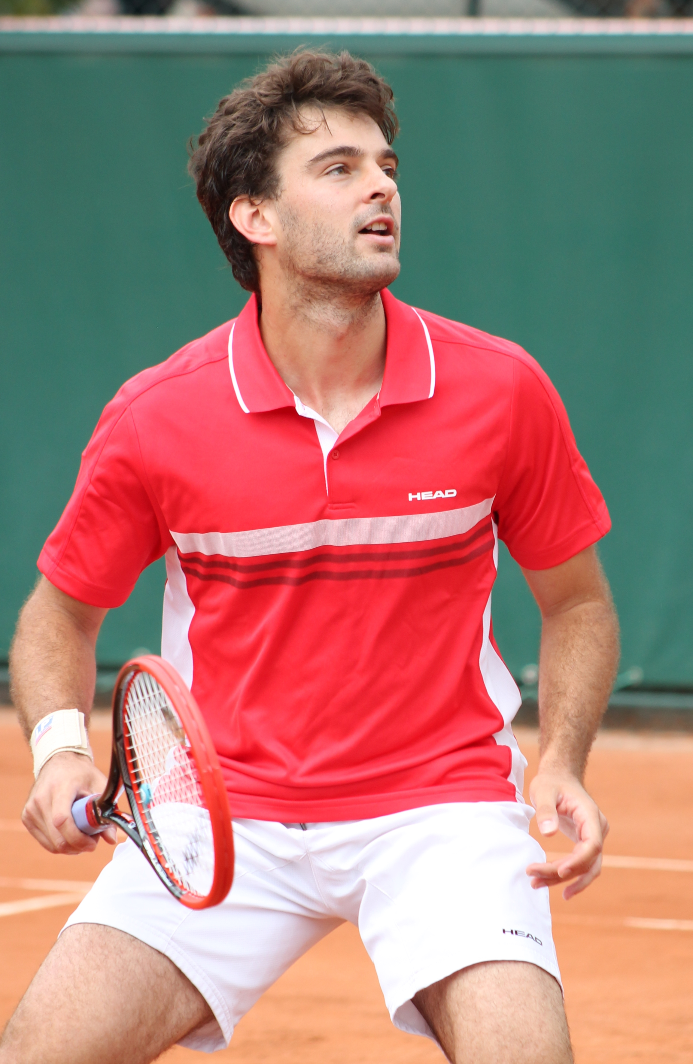 Draganja RG15 (11)